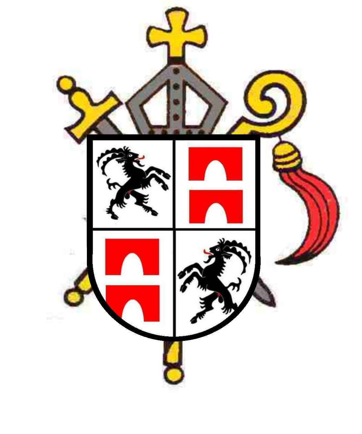 Wappen Beat a Porta, Fürstbischof von Chur 1565-1581